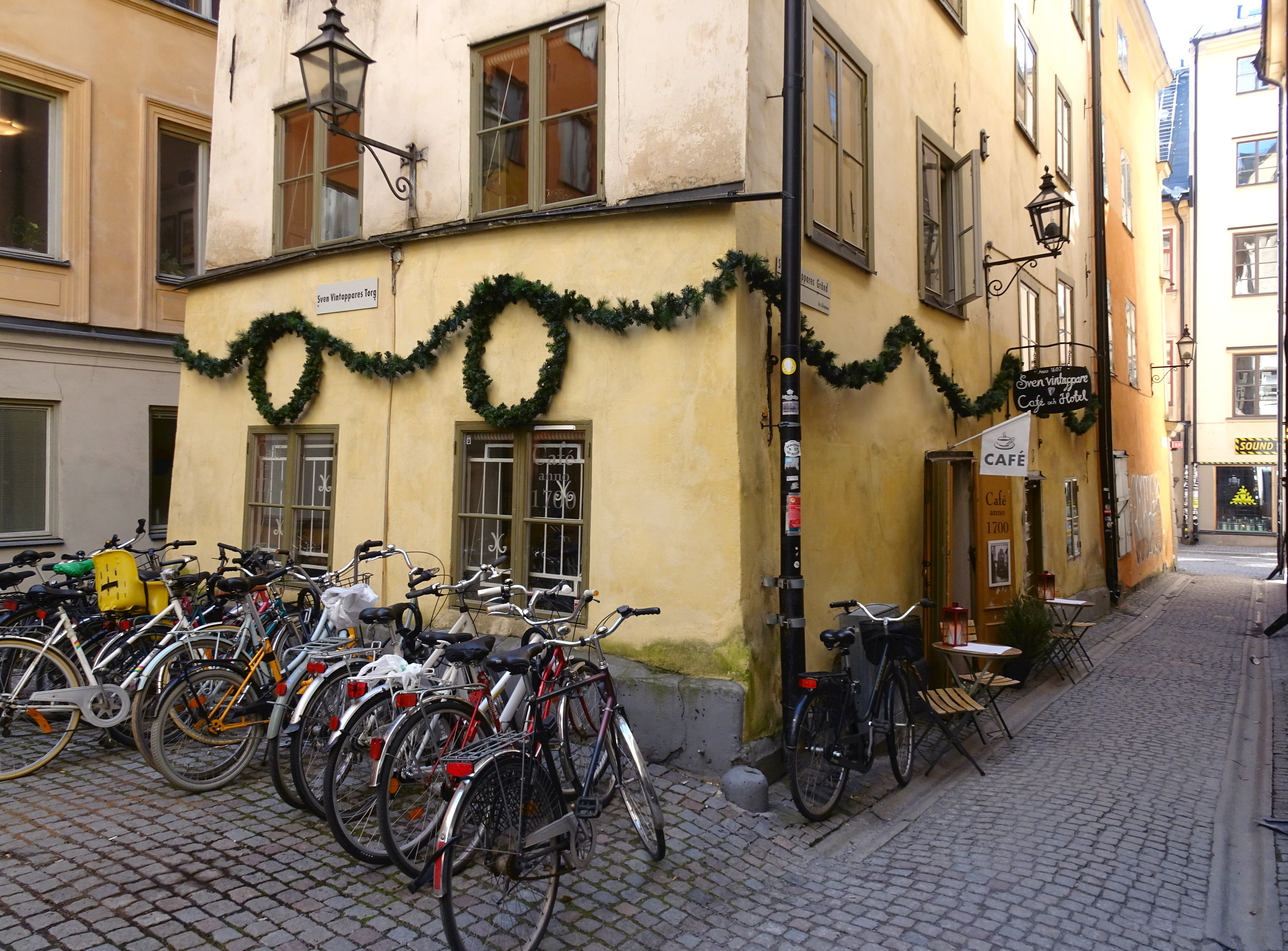 Sven Vintappares torg mot väster